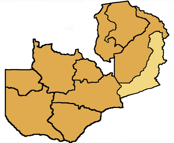 Mappa della diocesi di Chipata, in Zambia. Lavoro personale, eseguito a partire da questa immagine di Commons. Fonte per i confini: Guida delle missioni cattoliche 2005, a cura della Congregatio pro gentium evangelizatione, Roma, Urbaniana University Press, 2005. Categoria:Chiesa cattolica in Zambia Categoria:Mappe dell'Africa